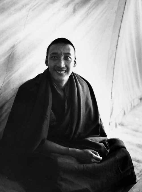 出家时期的德格格桑旺堆